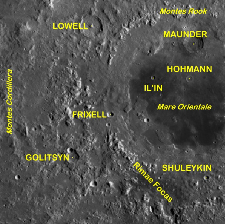 Cráter lunar Fryxell. Localización. (Imagen LRO)